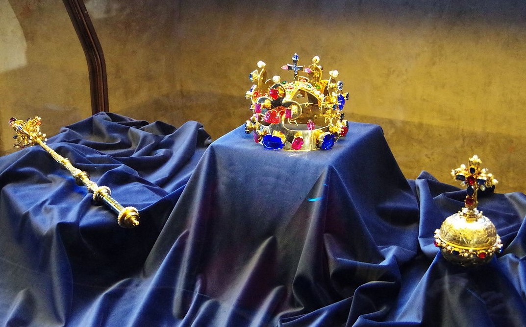 Böhmische Kronjuwelen